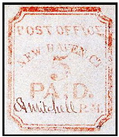 Почтовая марка США, NEW HAVEN, CONN Scott №8XU2